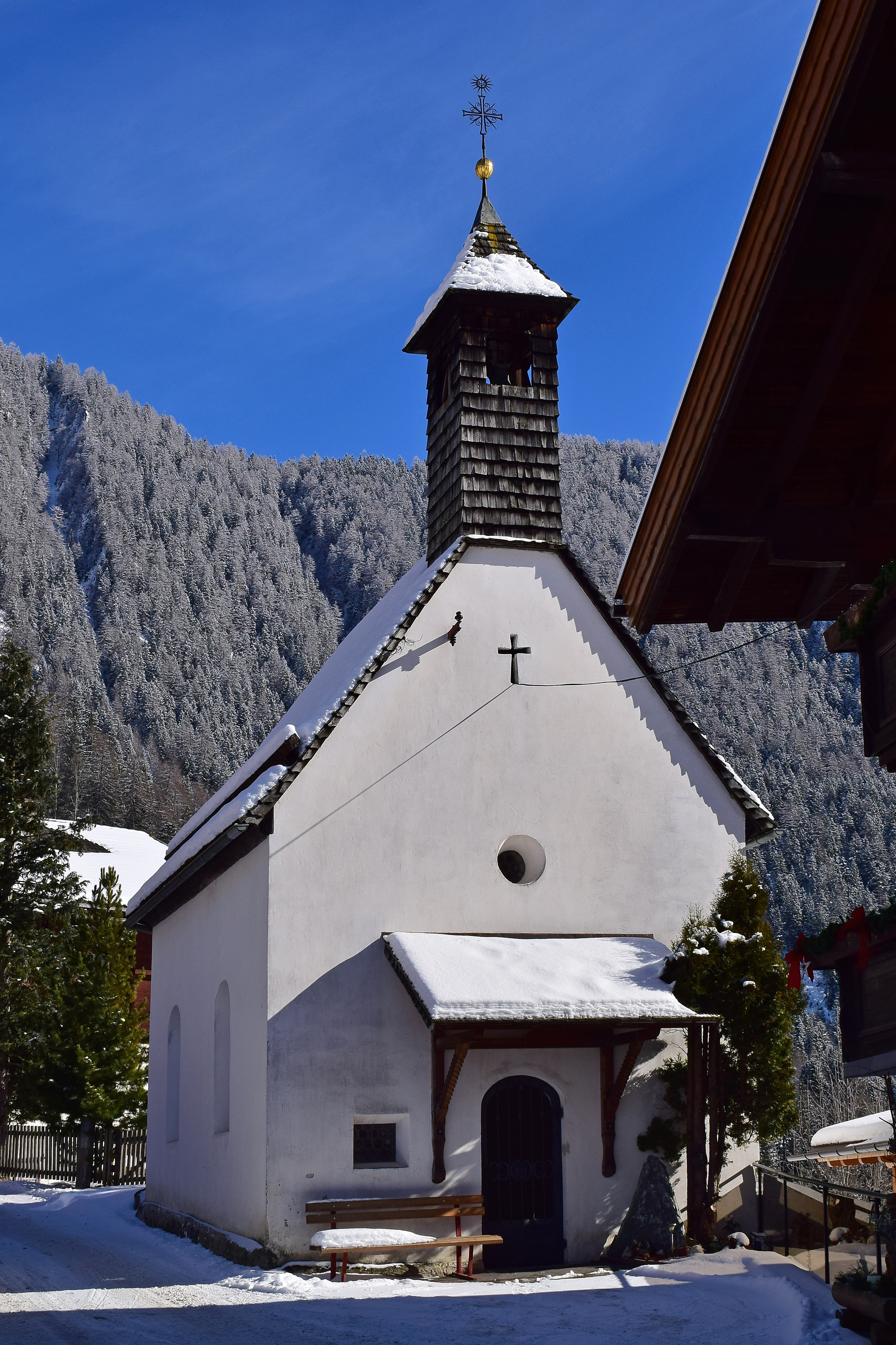 Kapelle hl. Josef in Bobojach im Virgental